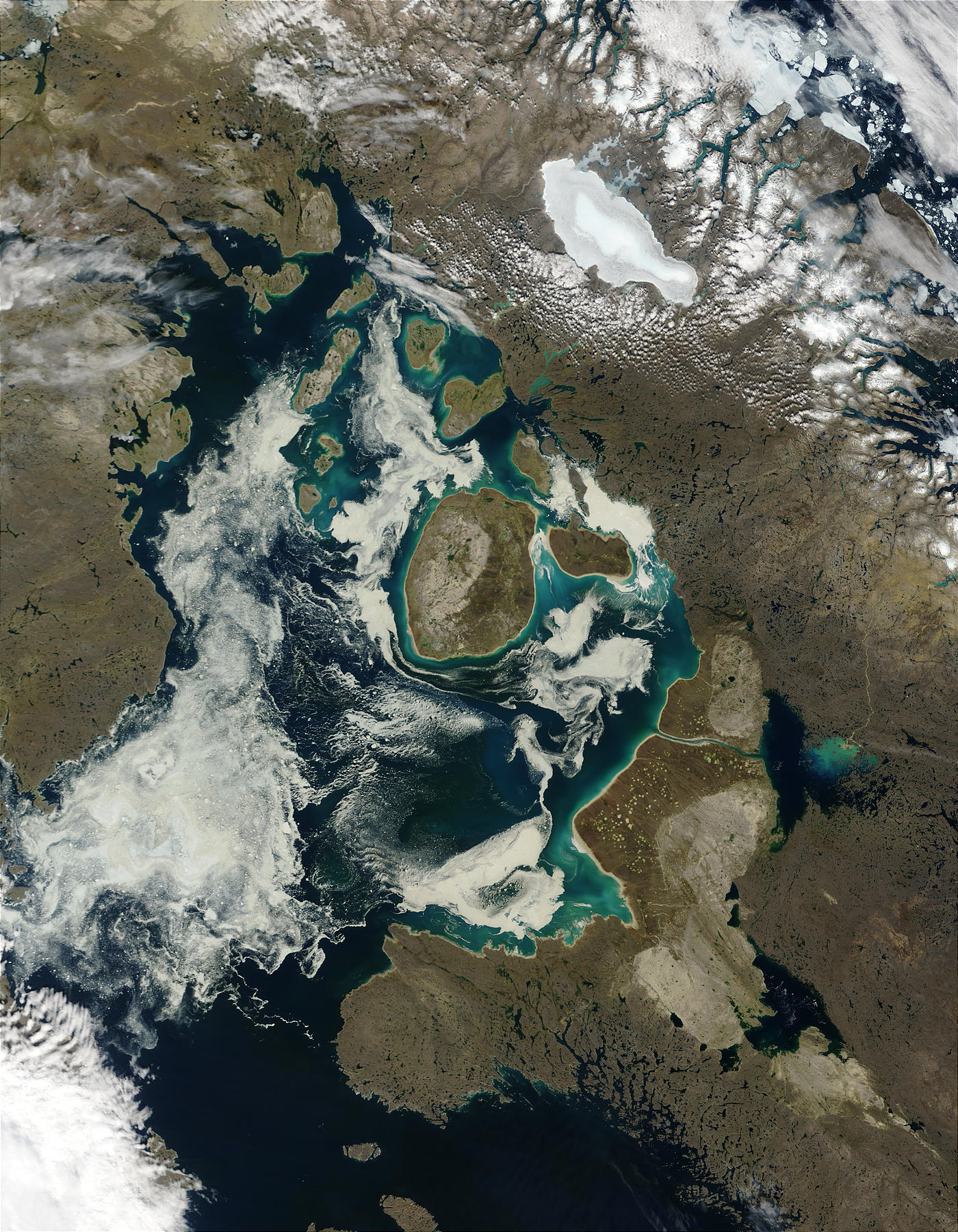 Foto de satélite de Cuenca Foxe, Canadá.